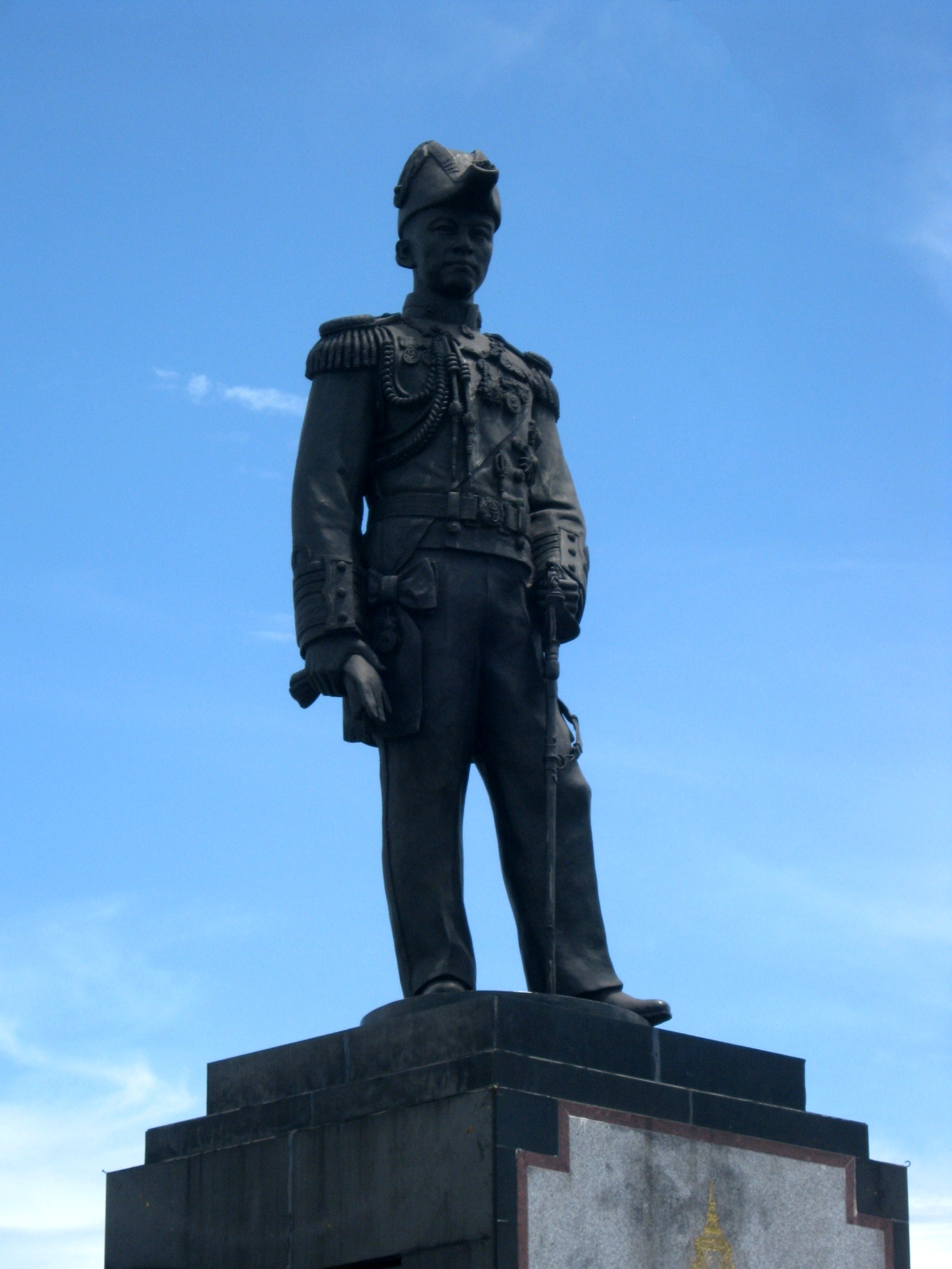 Памятник адмиралу принцу Чумпхону в Паттайе